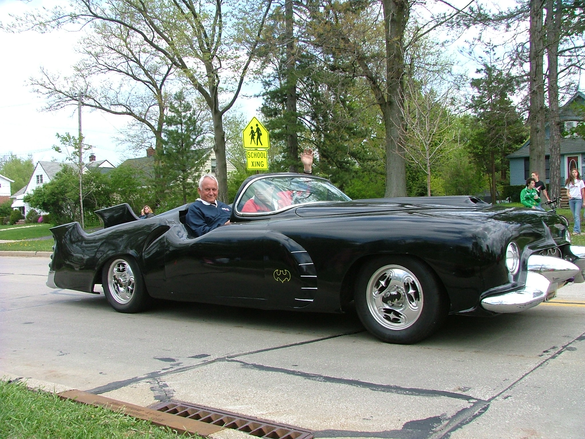 Attempt to create a batmobile.DSCF9216